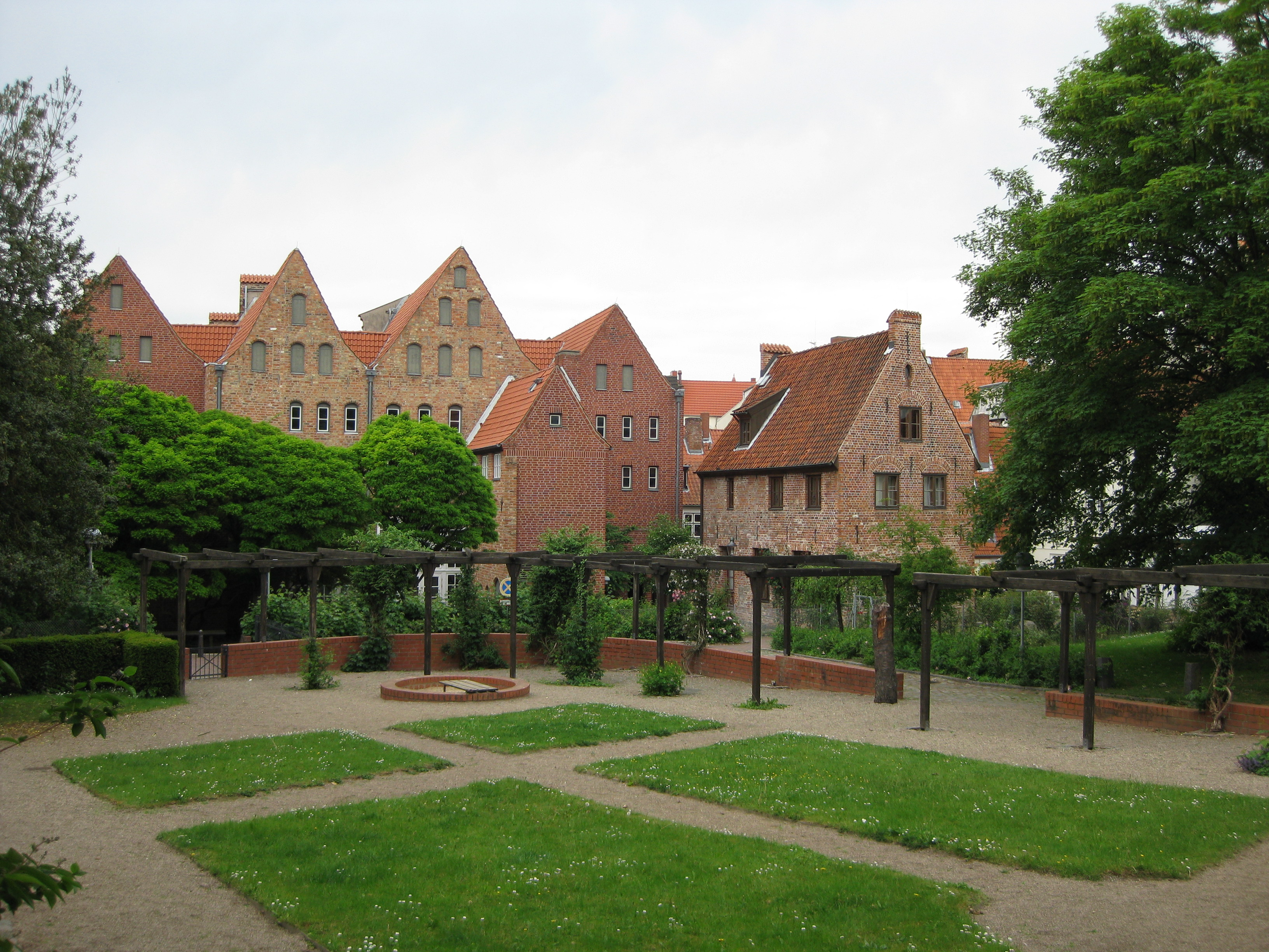 Freiflächen des ehemaligen Pockenhofs in der Kleinen Burg Straße der Lübecker Altstadt mit Blick auf die Rückfassaden des Engelswisch.